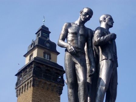 Denkmal für die Opfer des Faschismus, Teilansicht